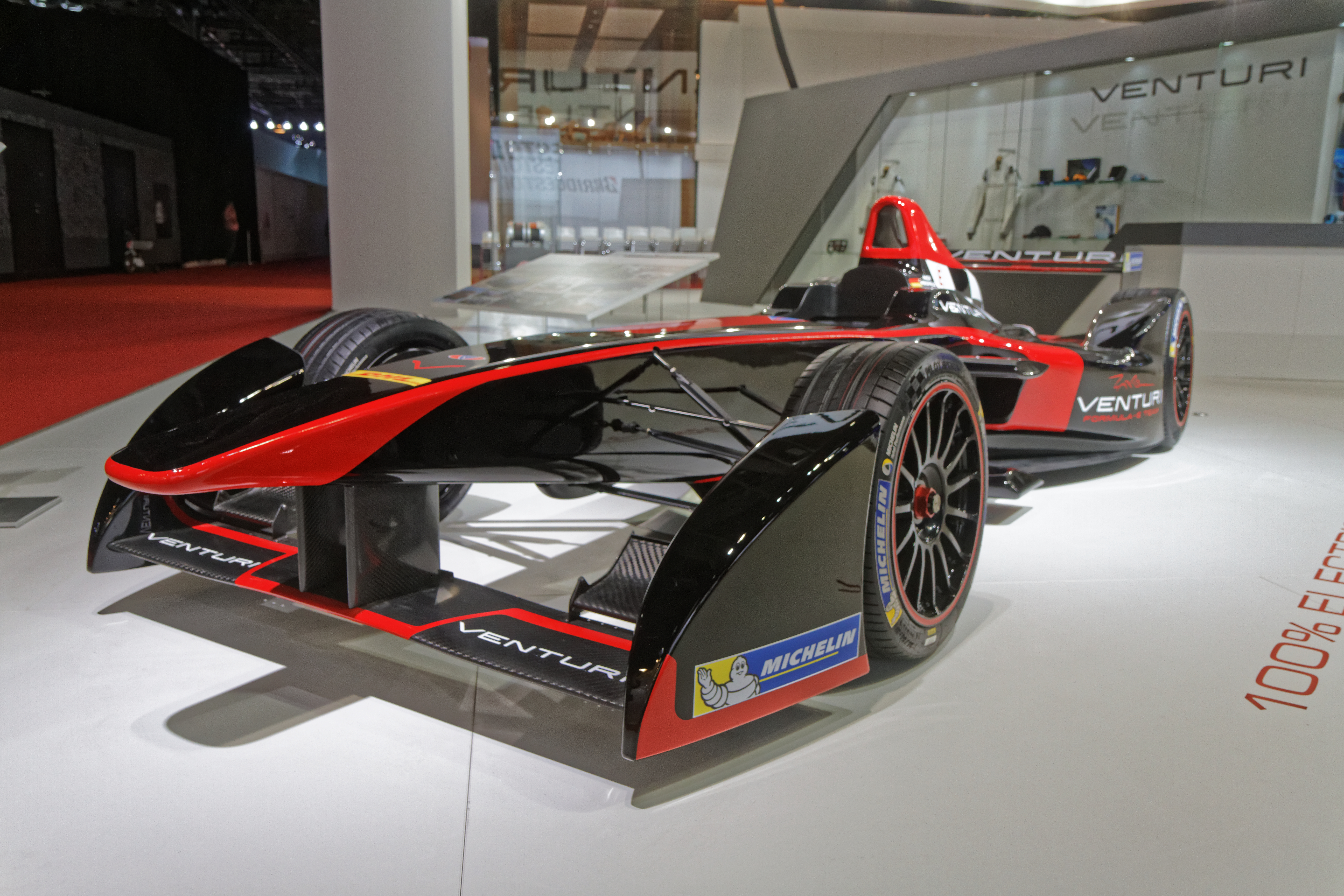 Une Spark-Renault SRT-01E présentée lors du mondial de l'automobile de Paris 2014.